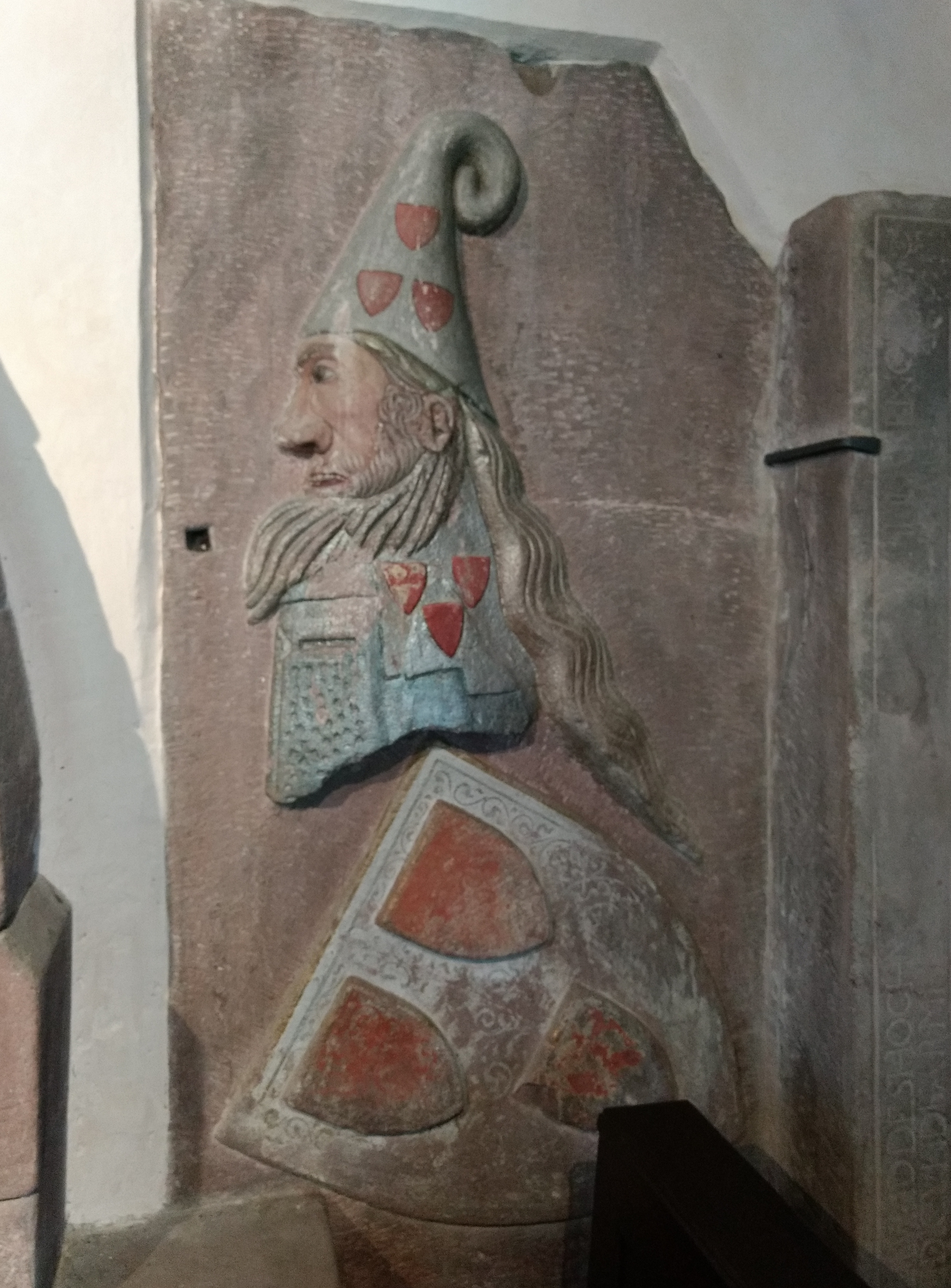 Kloster Wittichen